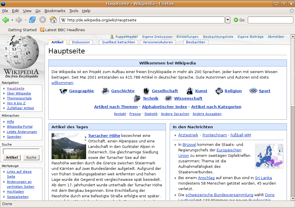 Bildschirmfoto von Firefox 1.5.0.3 unter Ubuntu 6.06 mit der Hauptseite der deutschen Wikipedia